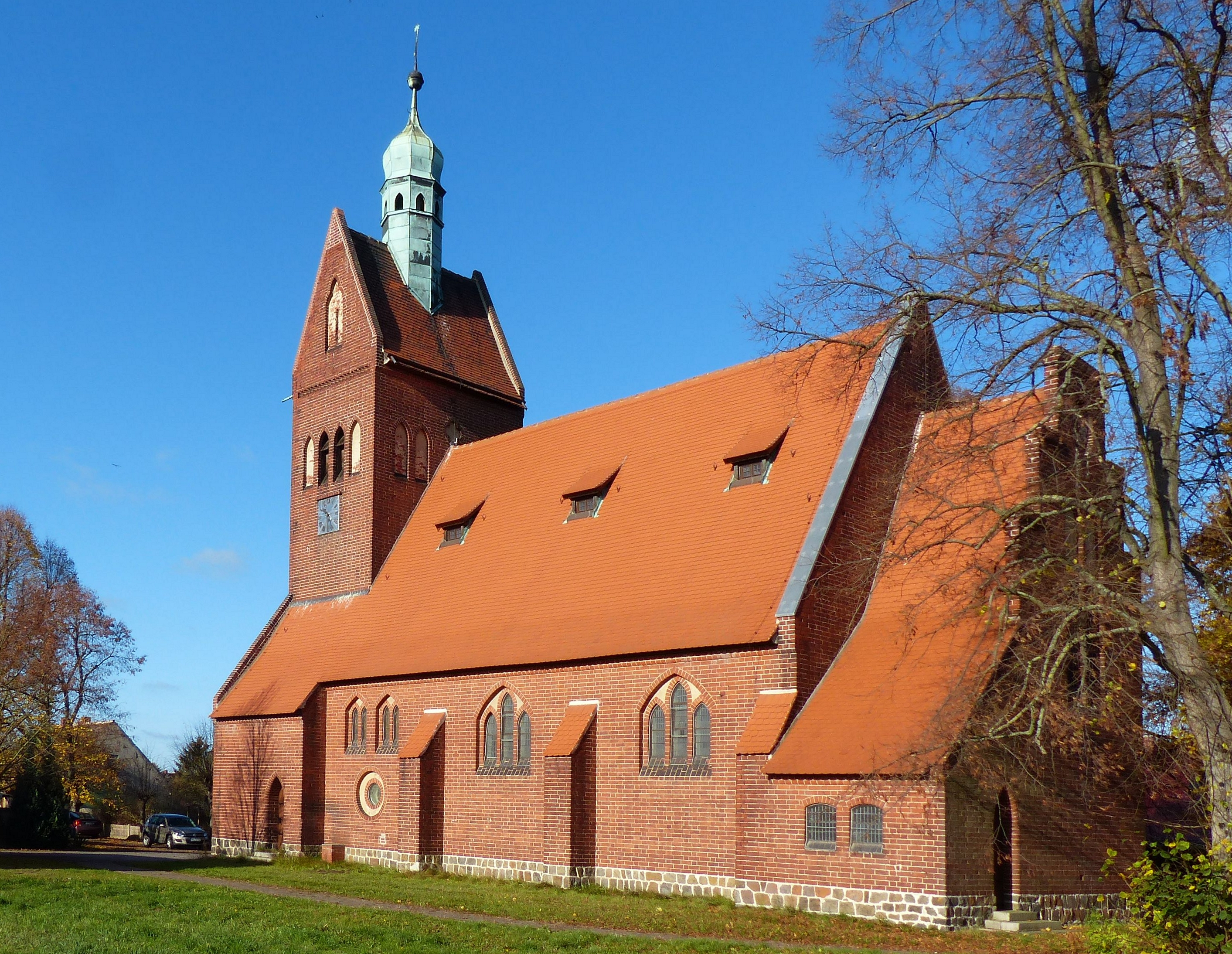 Zwar etwa mittig des langgesteckten Dorfes, aber doch eher an seinem Rande steht die noch junge, erst 1912 im neogotischen Stil errichtete Dorfkirche.